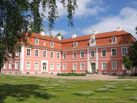 Schloss Wolfshagen, Prignitz, Brandenburg